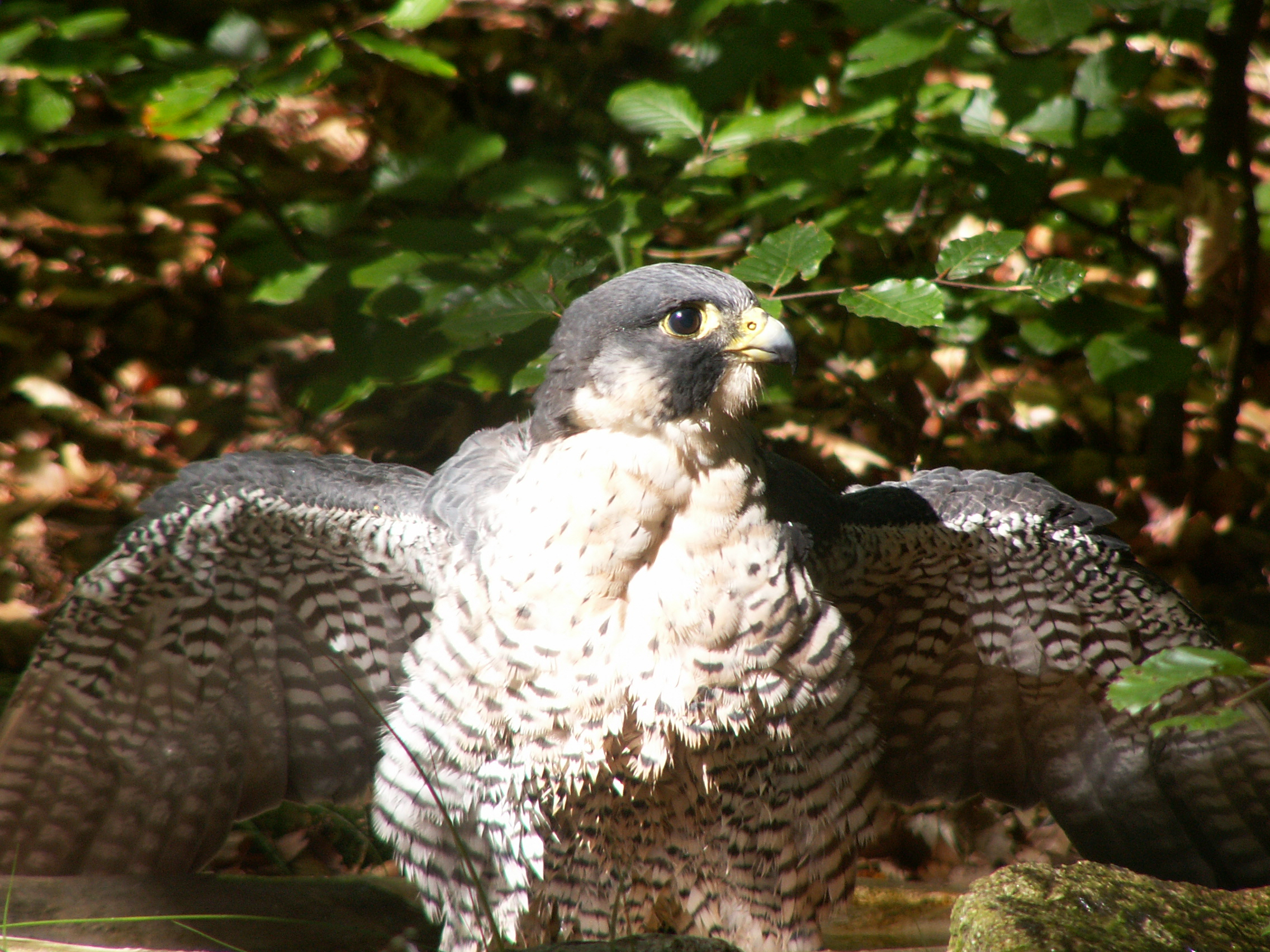 Pilgrimsfalk